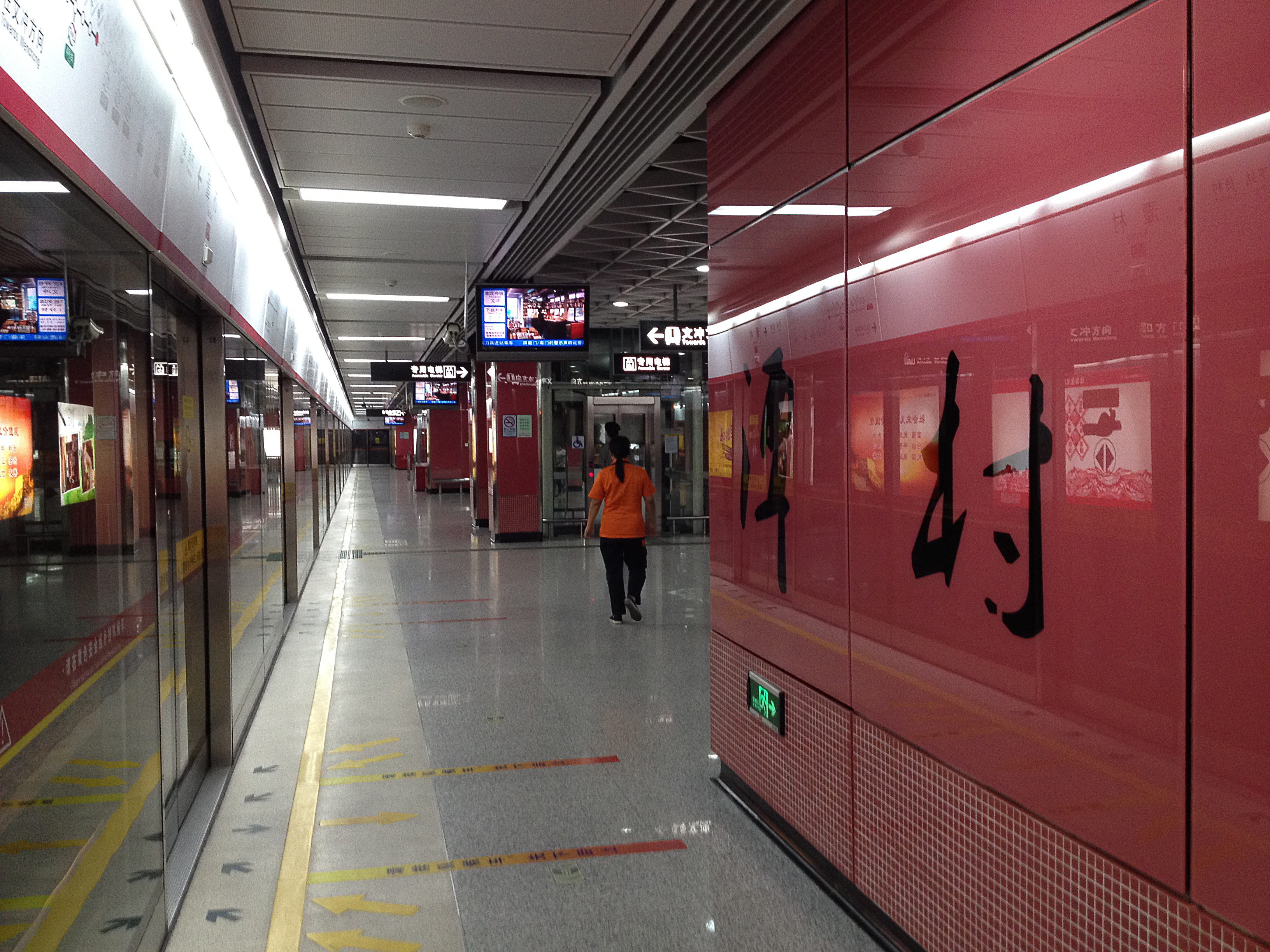 广州地铁潭村站月台（文冲方向）